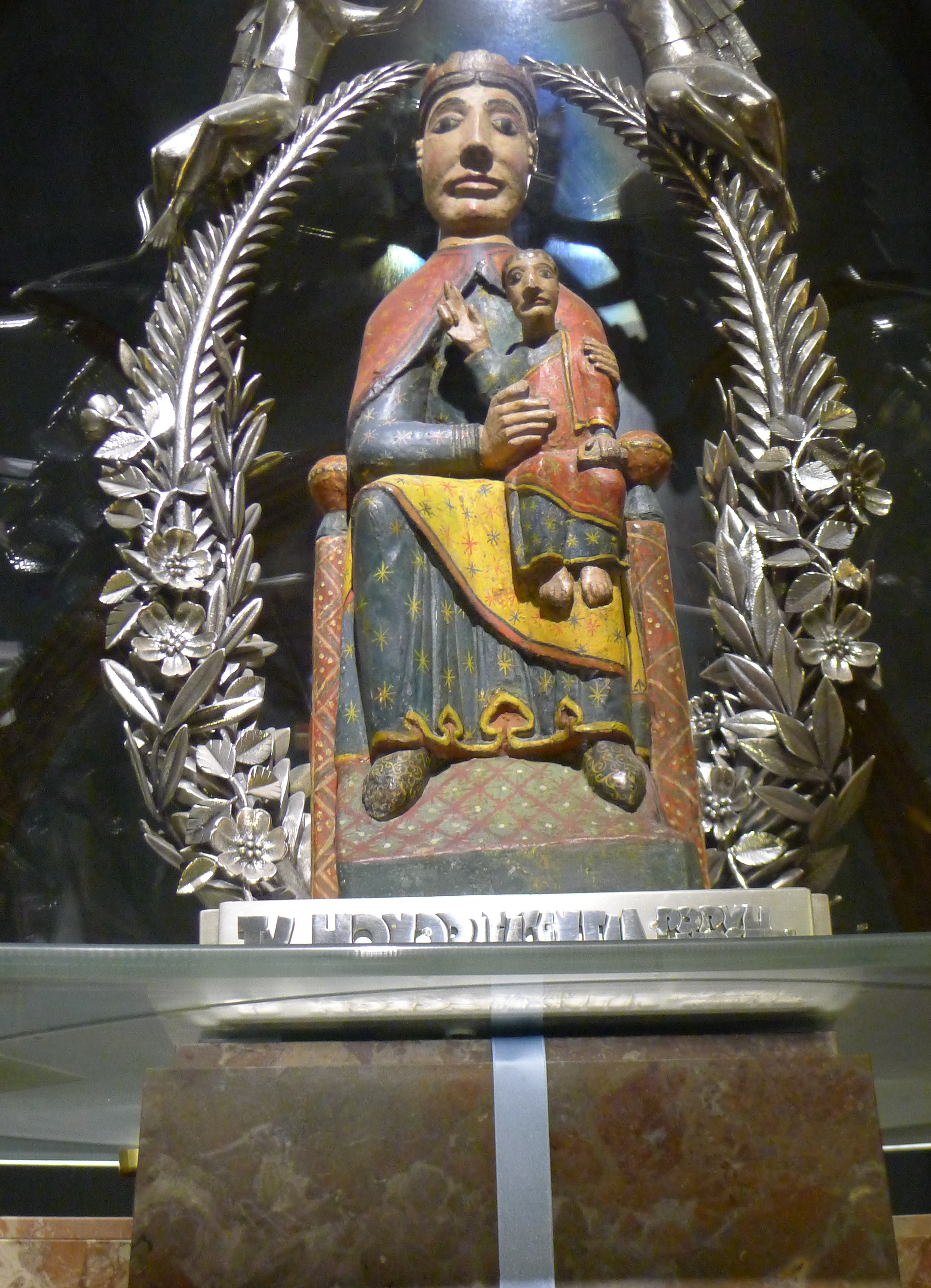 Santuario de Nuestra Señora de Nuria. Imagen románica, siglos XII o XIII.